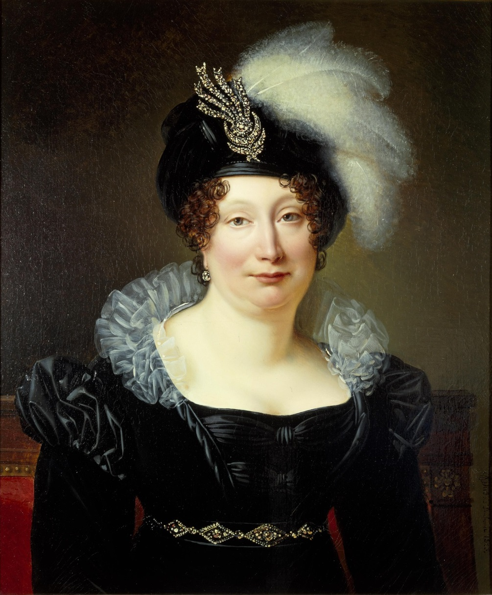 Portret van Helena Margaretha van Dielen